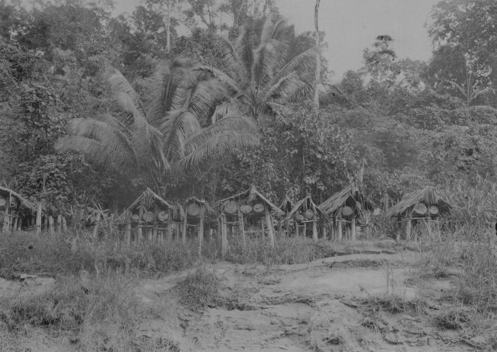 foto. Kerkhof op Siberoet